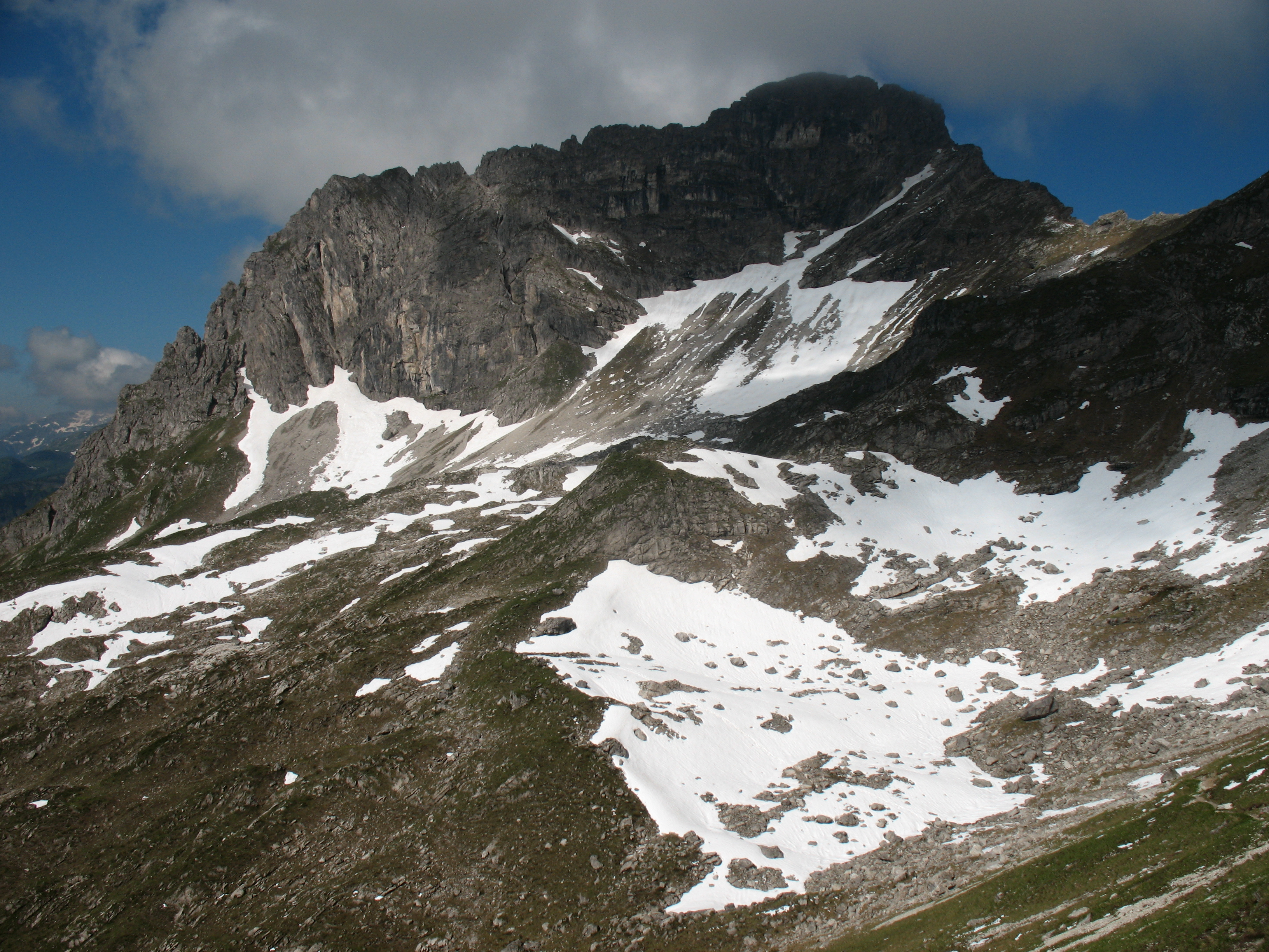 Blick vom Gebiet der Saubuckel oberhalb des Krumbacher Höhenwegs auf den Dritten Schafalpenkopf (2320 m).